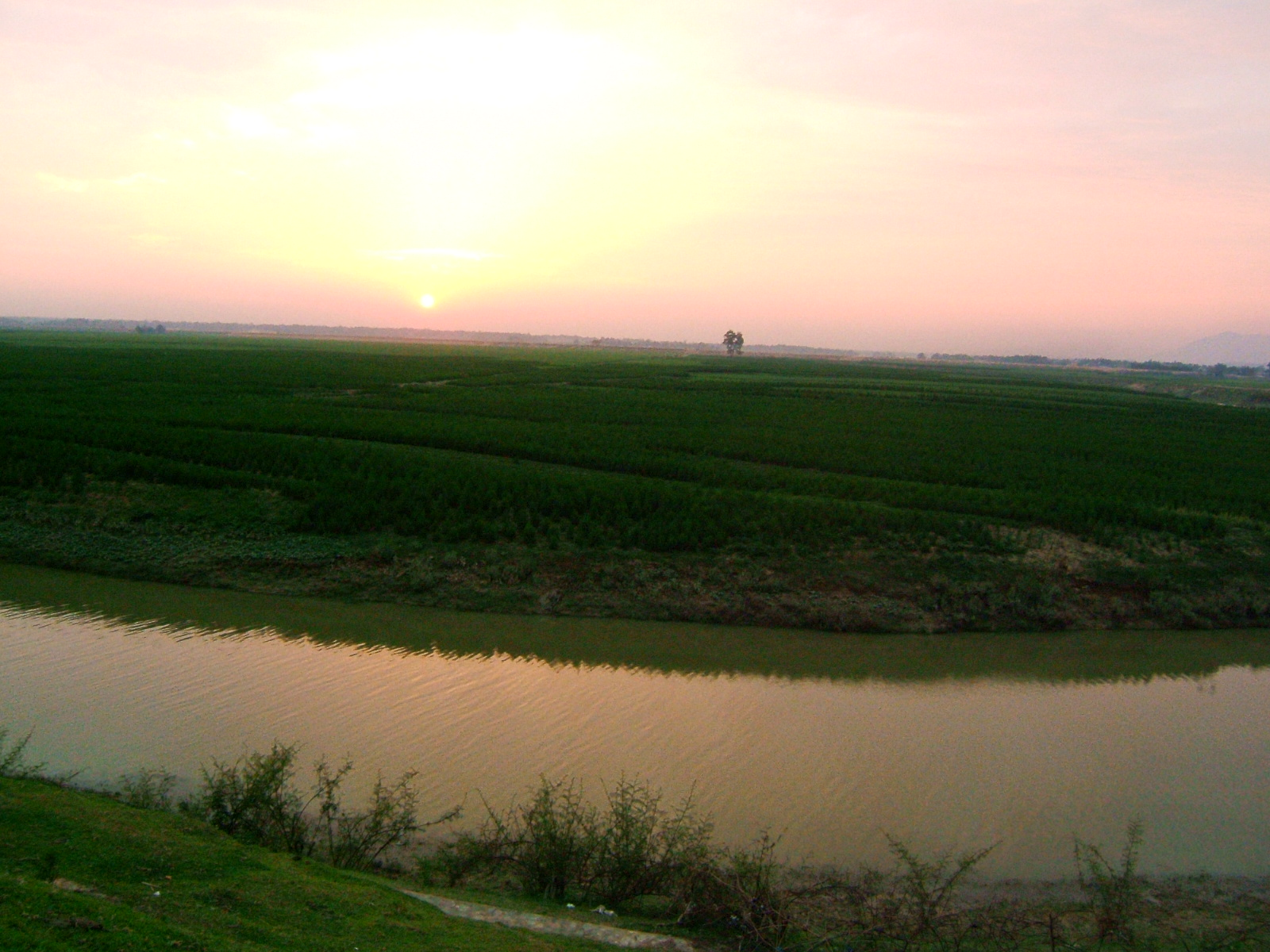 Một đoạn sông Phó Đáy chảy qua địa phận xã Đồng Ích, huyện Lập Thạch (ảnh chụp từ đê sông cạnh cây cầu Bến Gạo).